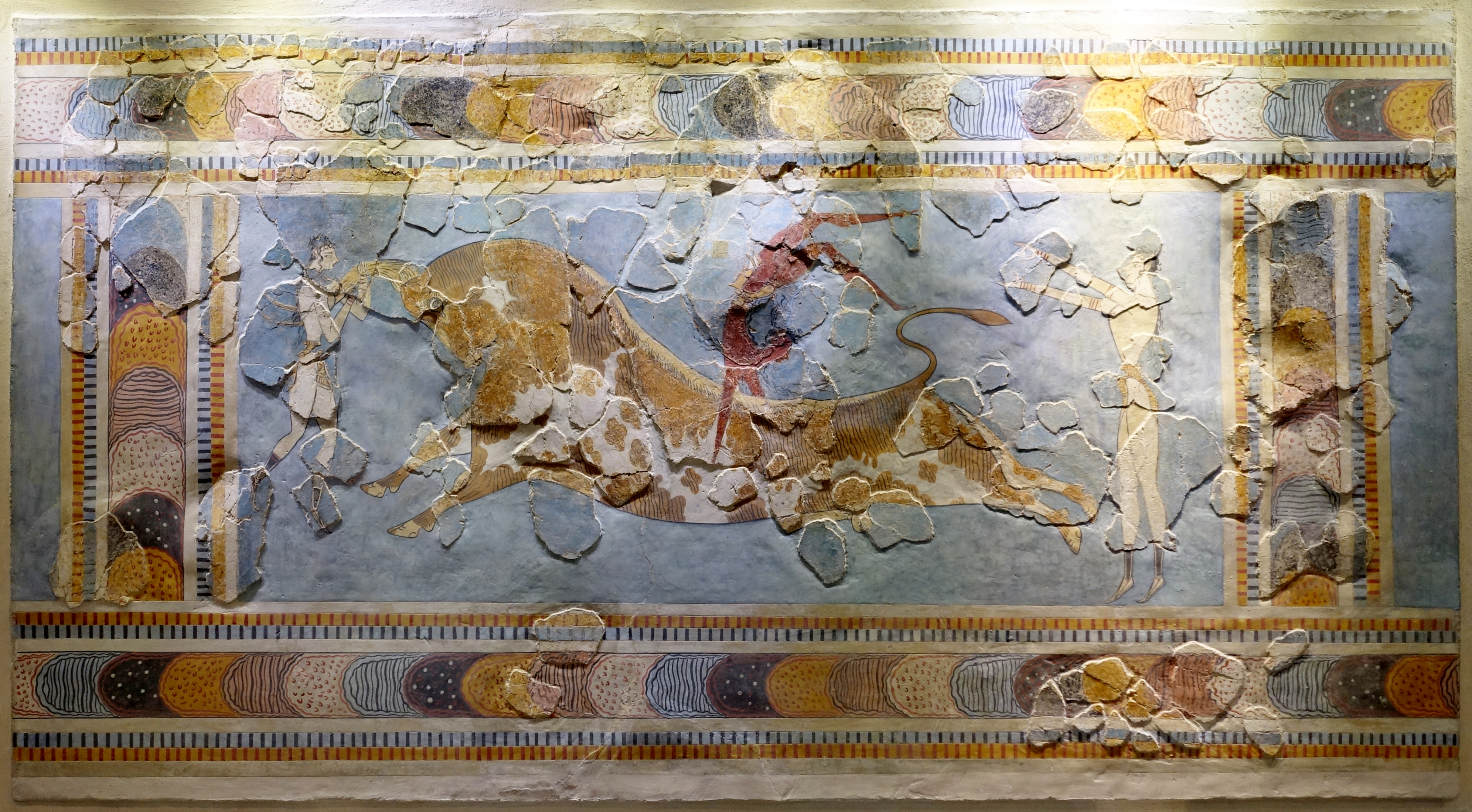 Stiersprungfresko (1600–1450 v. Chr.) aus dem Palast von Knossos, ausgestellt im Archäologischen Museum Iraklio, Kreta, Griechenland